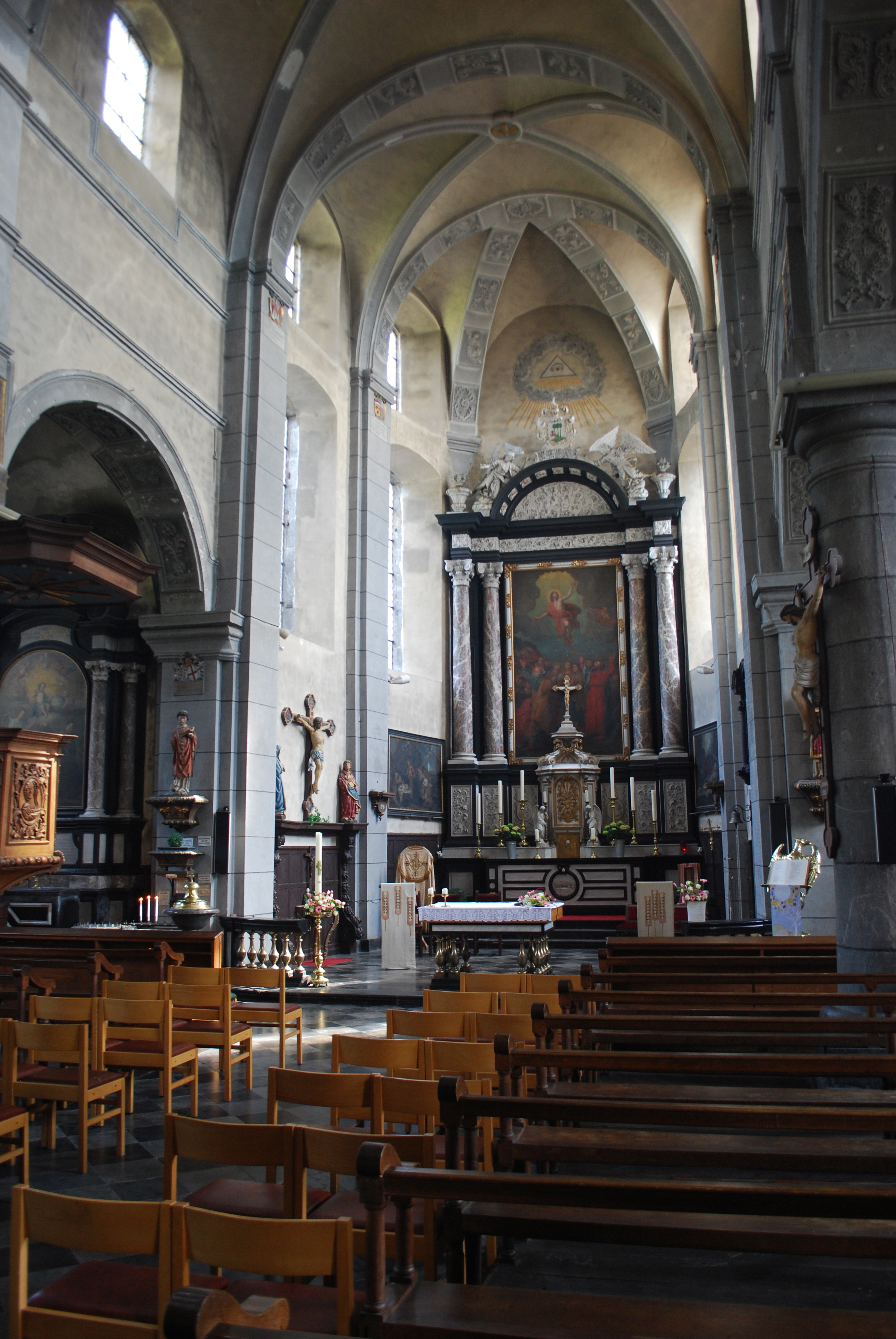 Vue de l'église Saint-Marcellin à Chokier, dans la commune de Flémalle (province de Liège, en Belgique).